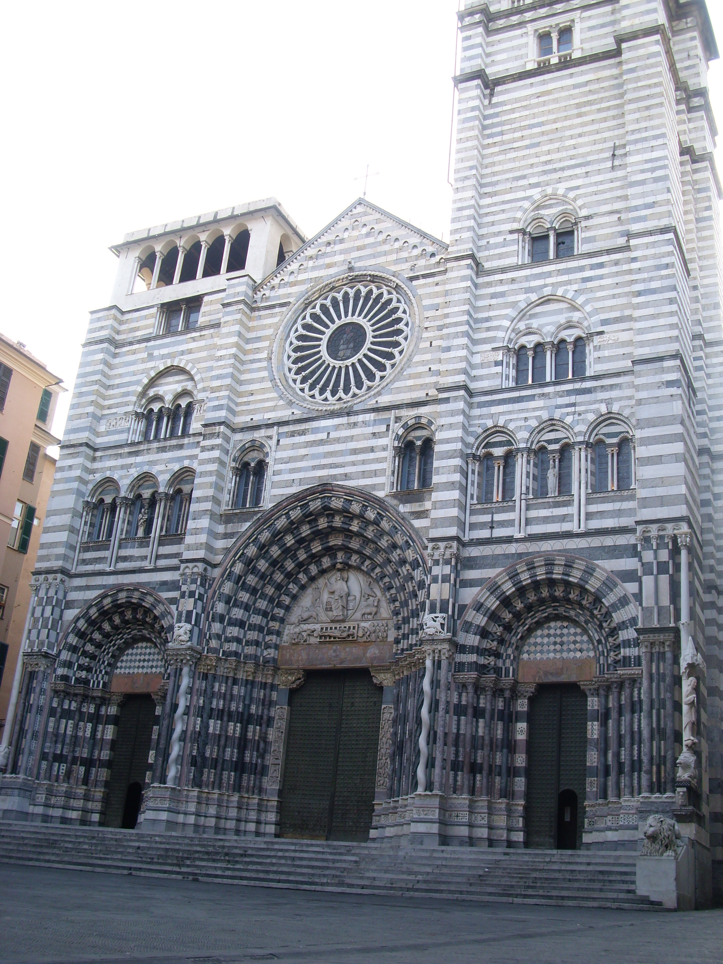 Cattedrale di San Lorenzo, a Genova. La facciata.